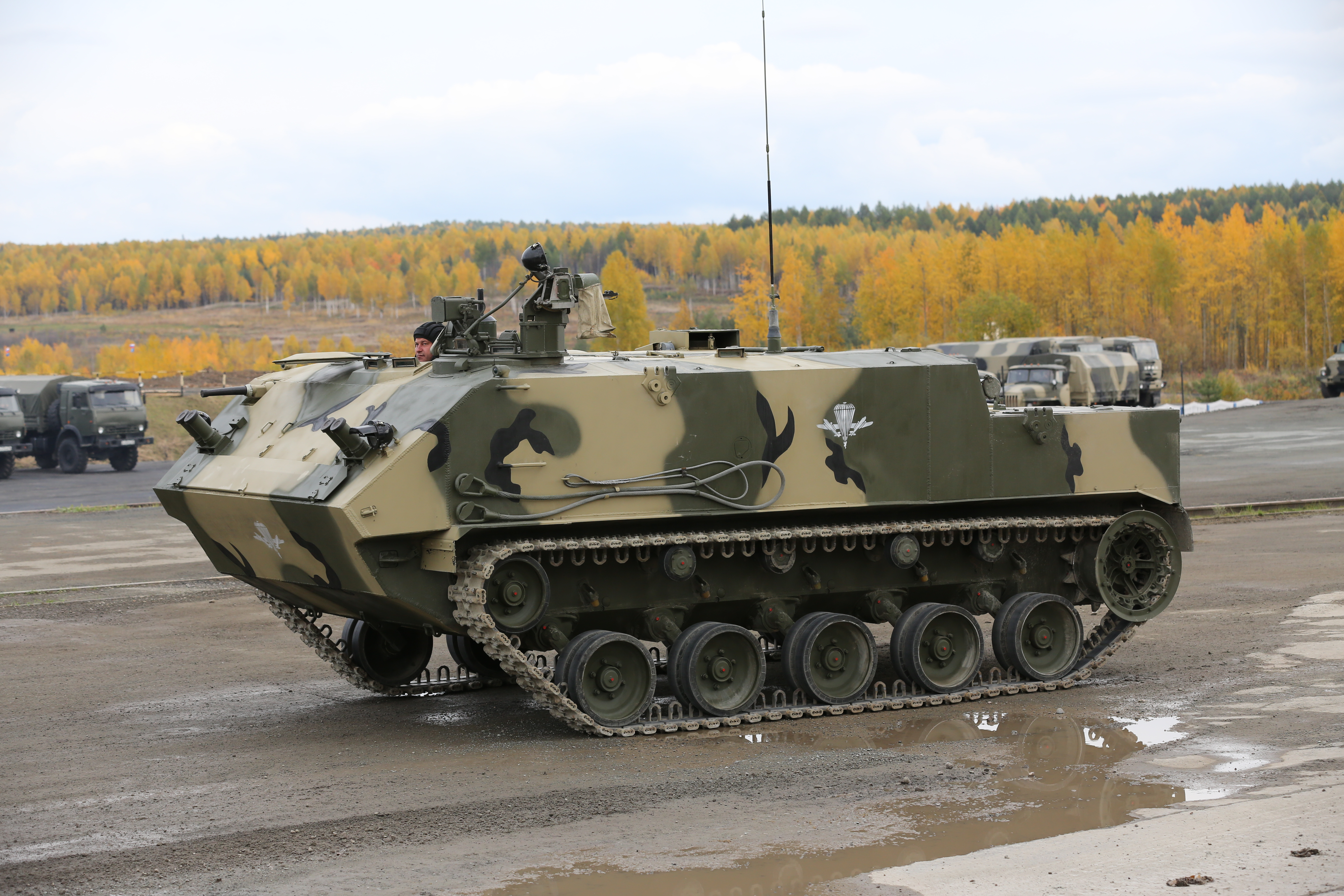 Бронетранспортёр БТР-МДМ Ракушка-М (Airborne tracked armoured personnel carrier BTR-MDM Rakushka-M)